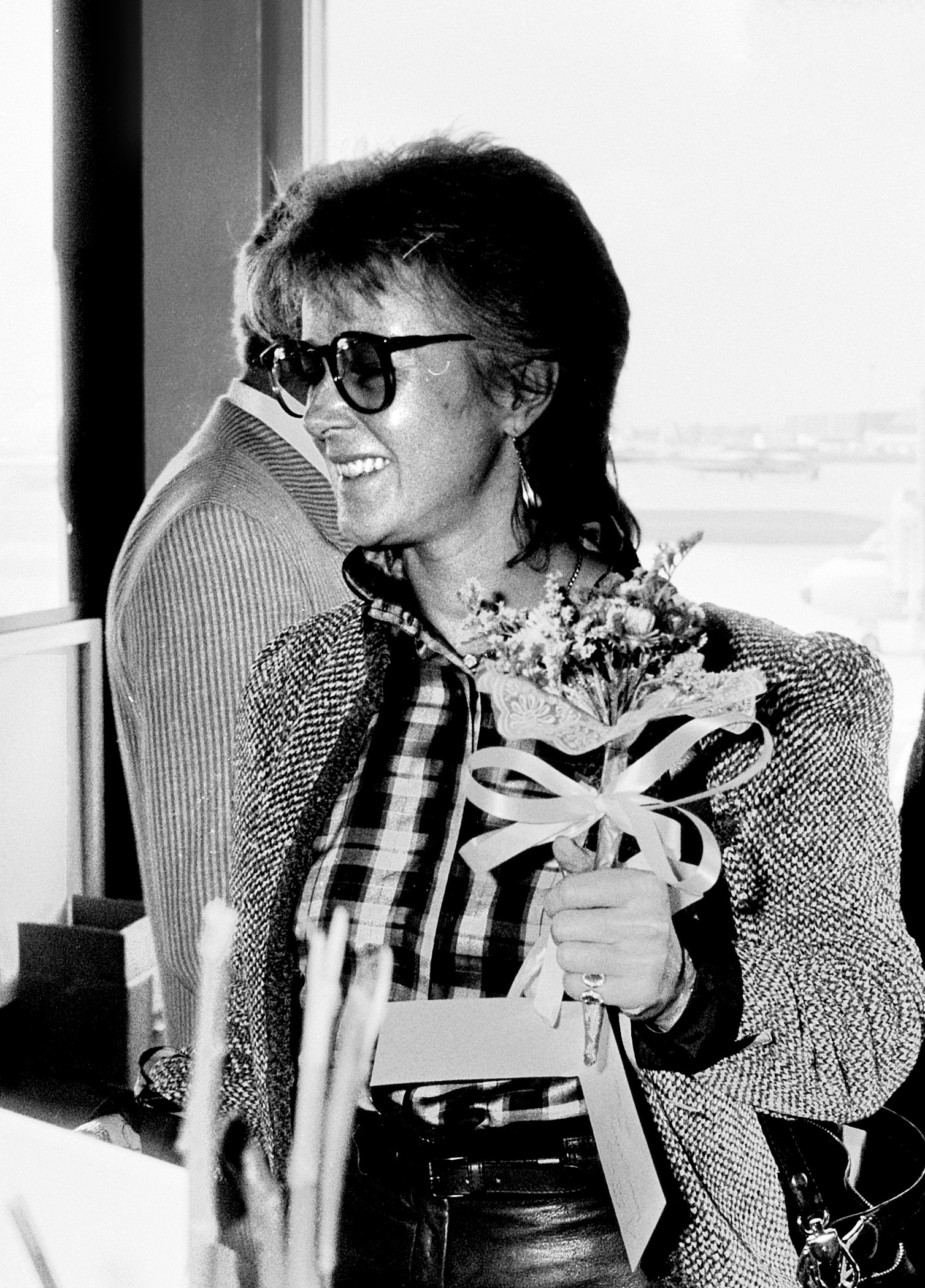 Aankomst Abba-zangeres Frida op Schiphol